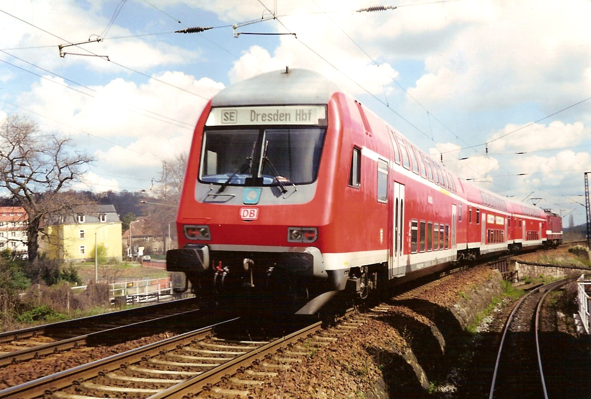 Die Weißeritztalbahn bei Freital-Hainsberg. Der Doppelstockzug verkehrt auf der parallel verlaufenden Bahnstrecke Dresden–Werdau.